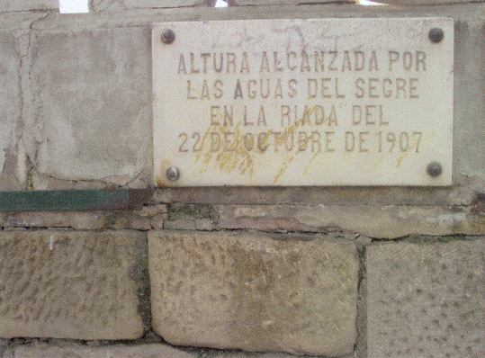 Cartel donde pone hasta donde llego el agua.